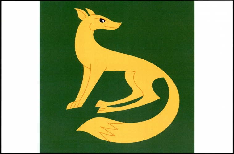 vlajka, Vícenice, okres Třebíč